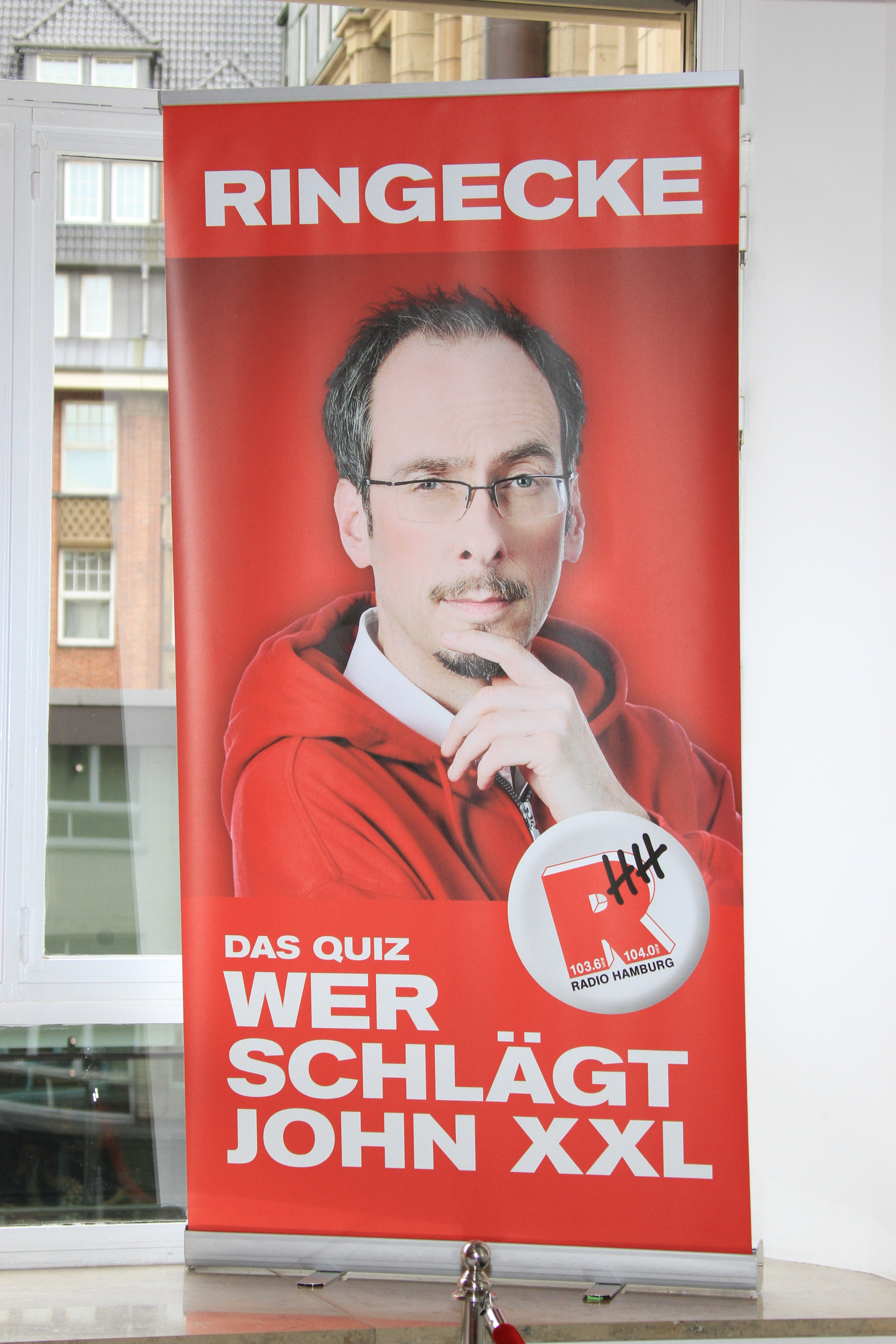 Aufsteller von Radio Hamburg, für die Sendung: Wer schlägt John xxl